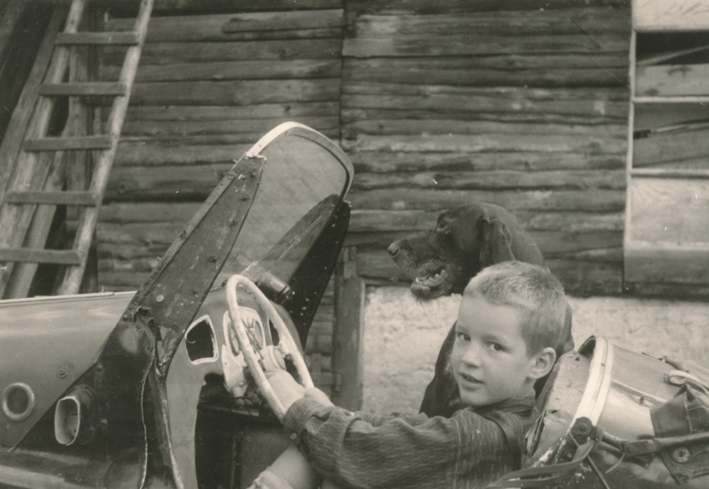 Deutsch Drahthaar Jagdhund neben dem Autor in dessen Kleinschnittger Cabriolet Datum: 03.07.1962 Quelle: privates Fotoarchiv des Urhebers Urheber: M. Pfeiffer alias Gordito1869 (Selbstauslöser - wenn ich mich recht erinnere)